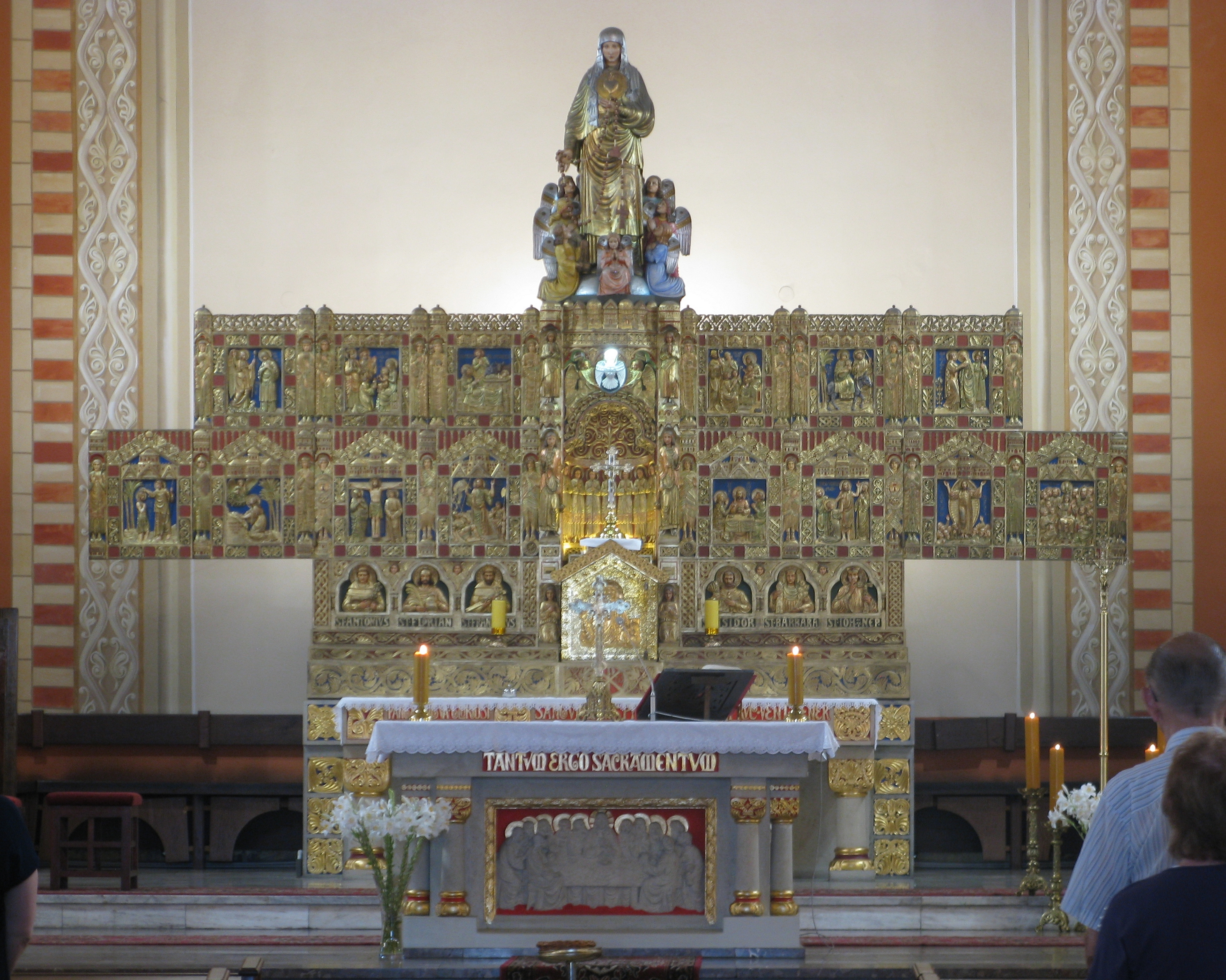 Ołtarz główny kościoła Matki Bożej Różańcowej w Świętochłowicach-Chropaczowie, projekt prawdopodobnie Johannesa Franziskusa Klompa.